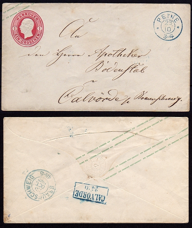 Briefverkehr, Brief an den Apotheker Bodenstab in Calvörde